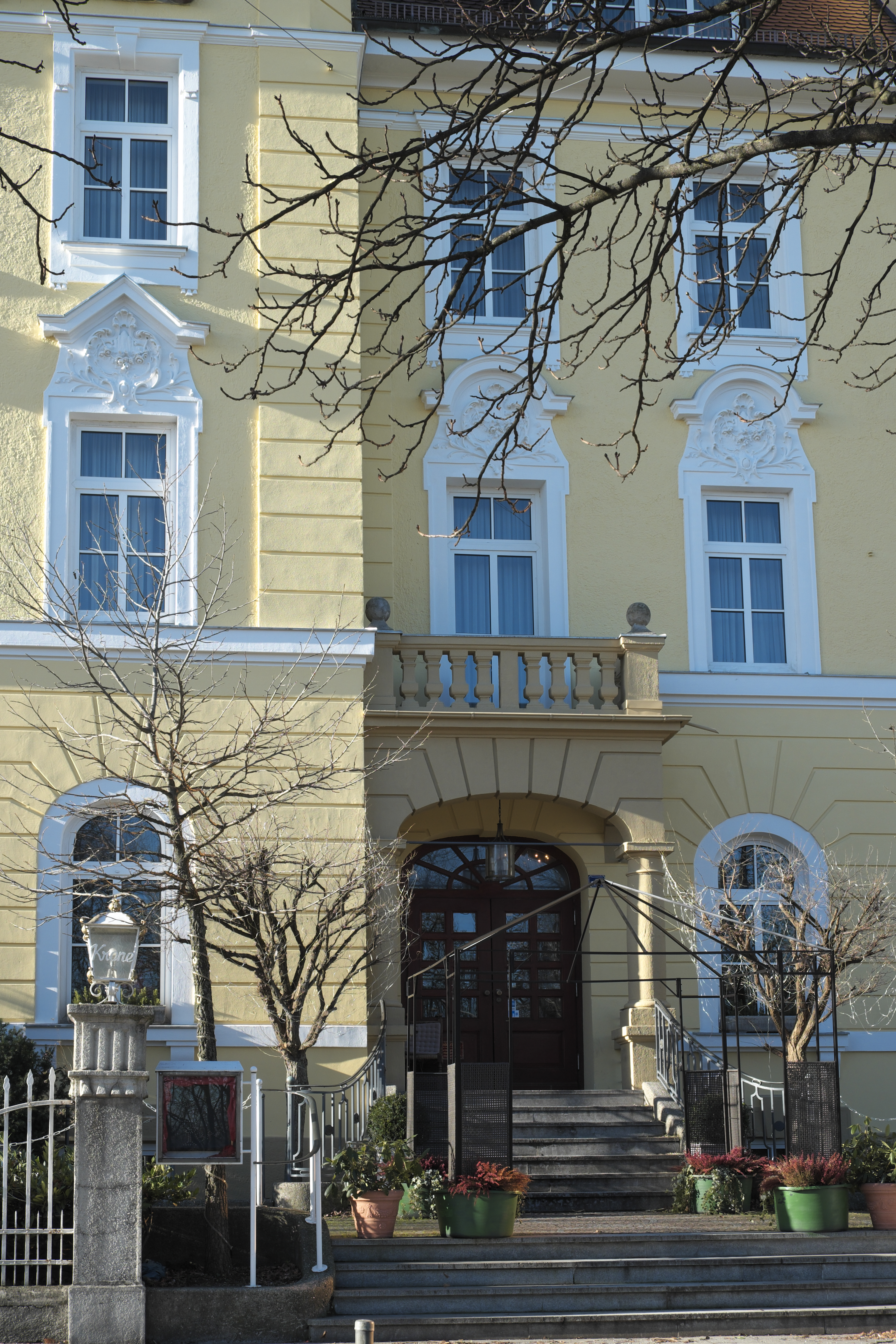 Hotel Krone an der Theresienhöhe 8 im Stadtbezirk Schwanthalerhöhe in München (Bayern/Deutschland), 1897/98 von Ignaz Batz erbaut